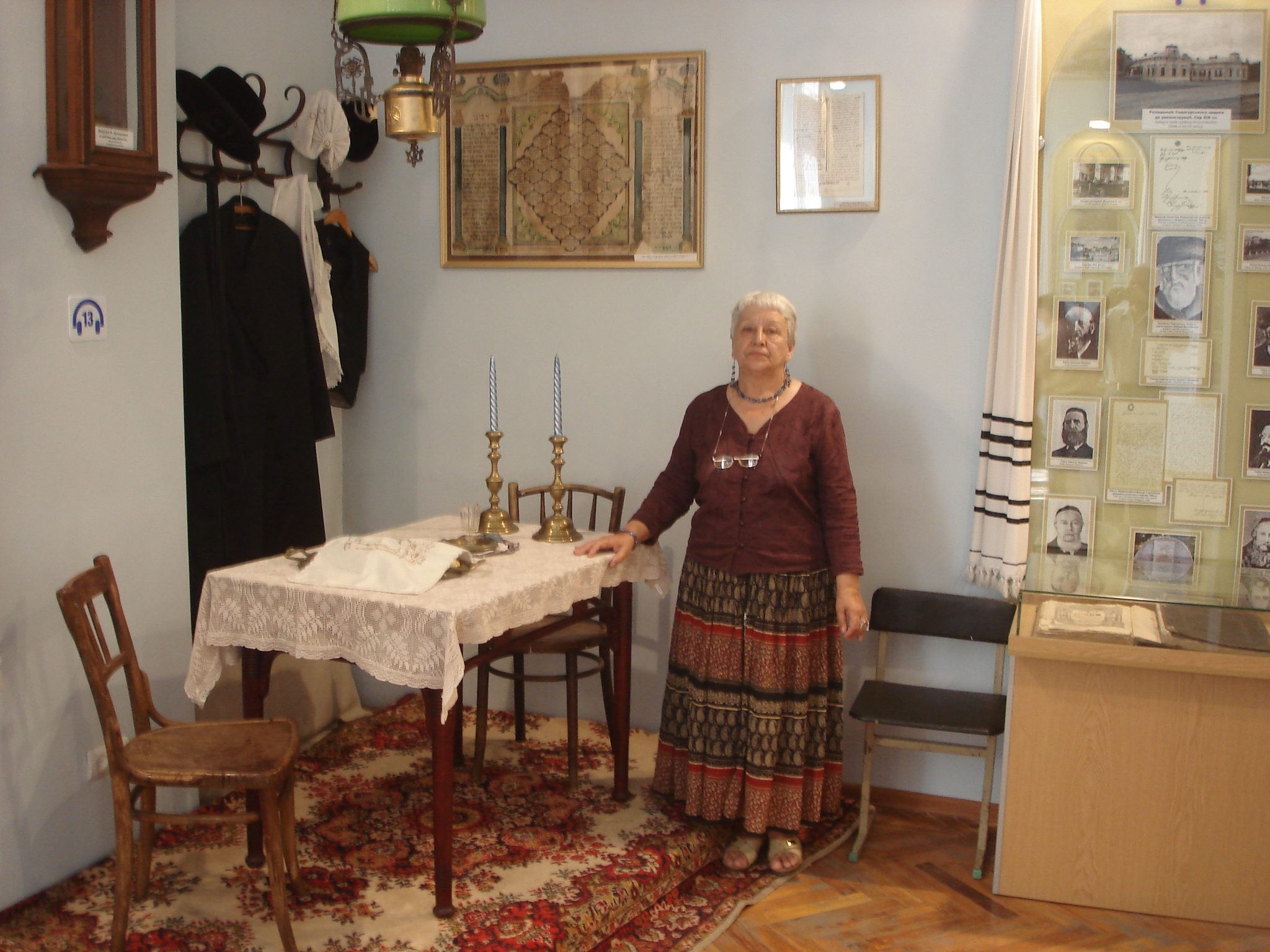 фото розробника музею Шевченко Світлани